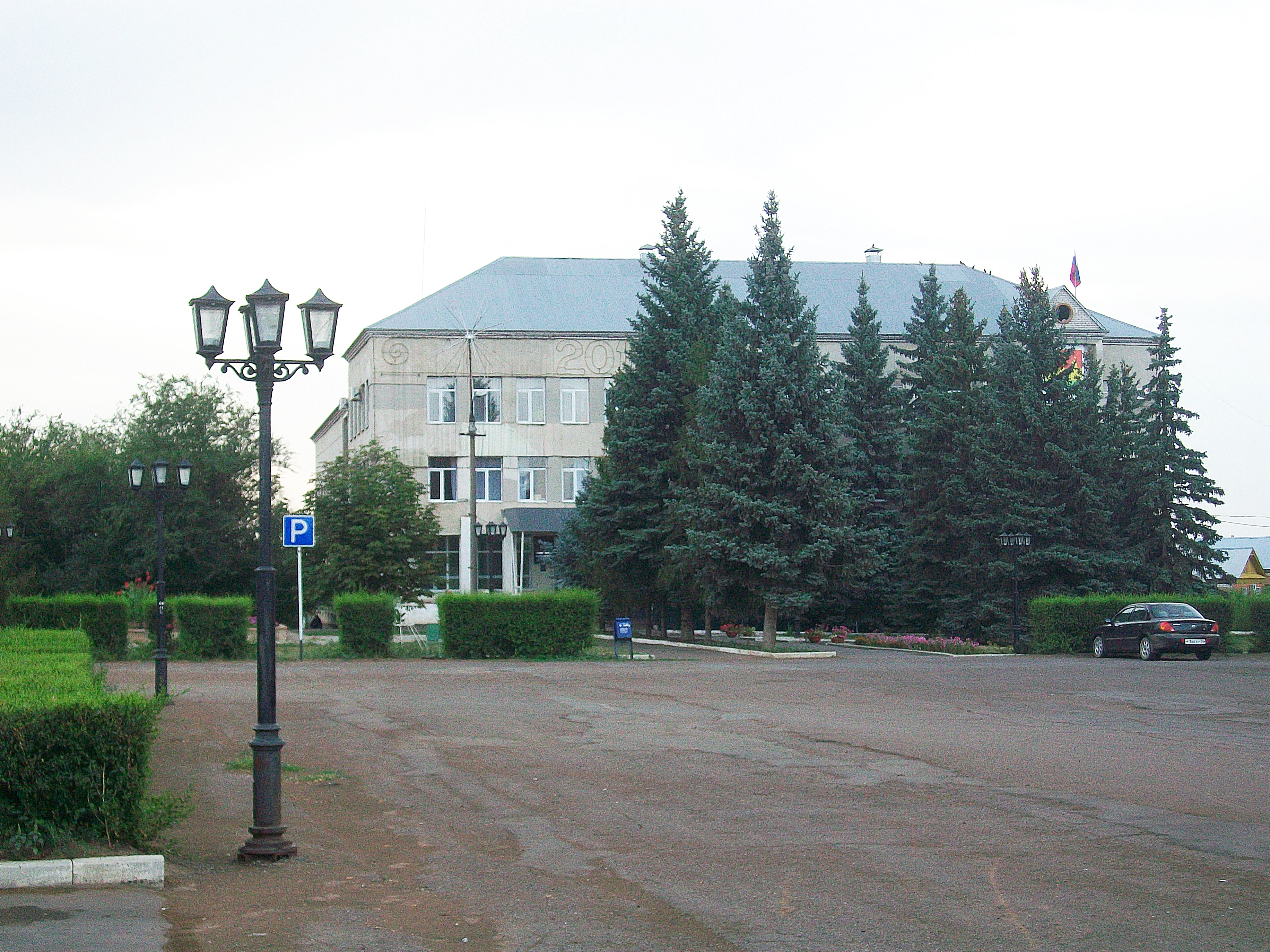 Здание администрации города Сорочинска.